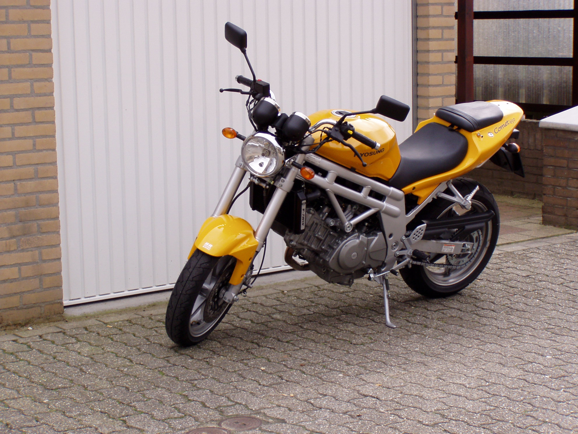 Toestemming van Tom Smeets (eigen foto)